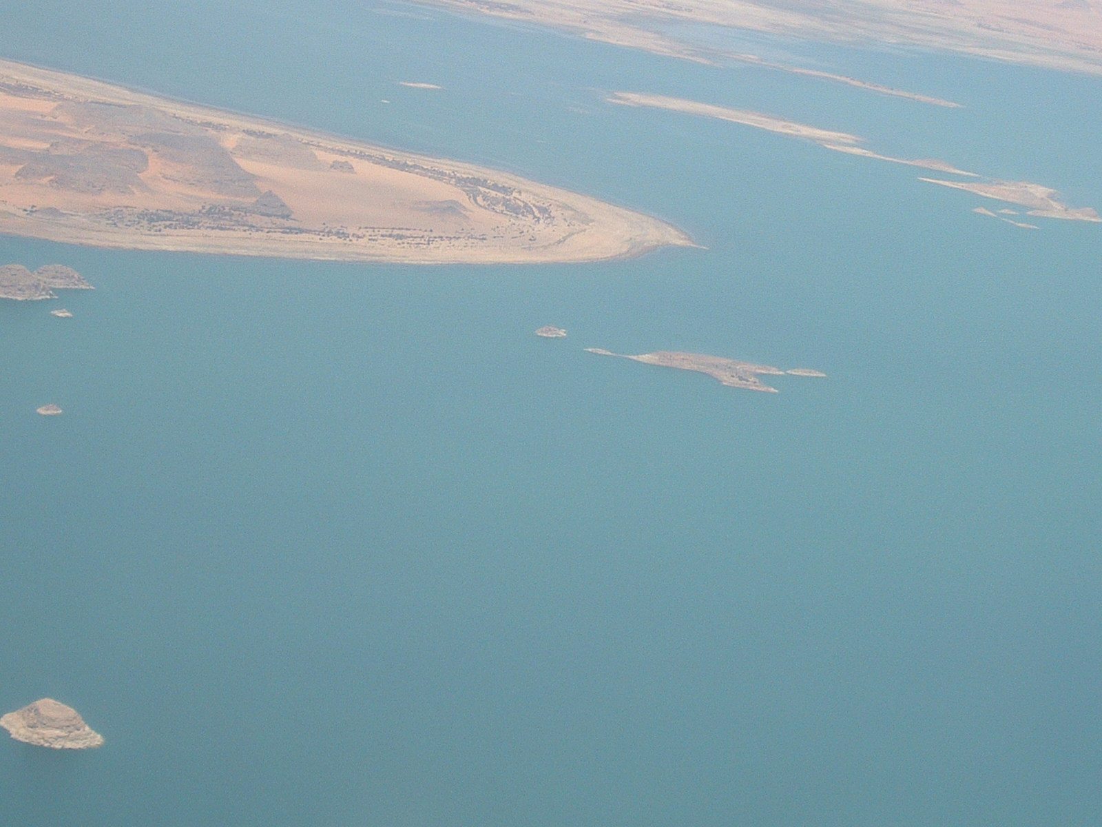 Veduta aerea di una parte del Lago Nasser. È una foto scattata da me.